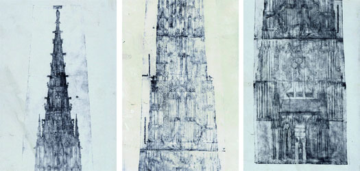 Planriss des Westturms des Ulmer Münsters, Ende des 15. Jahrhunderts; Ulmer Museum